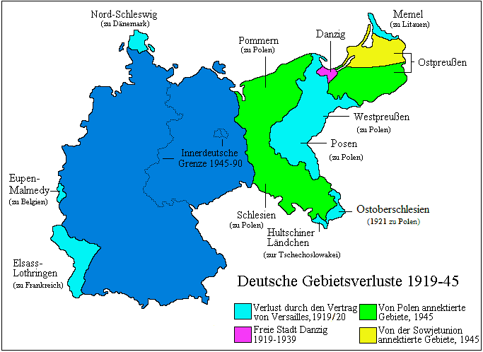 Gebietsveränderungen von Deutschland 1871-1991